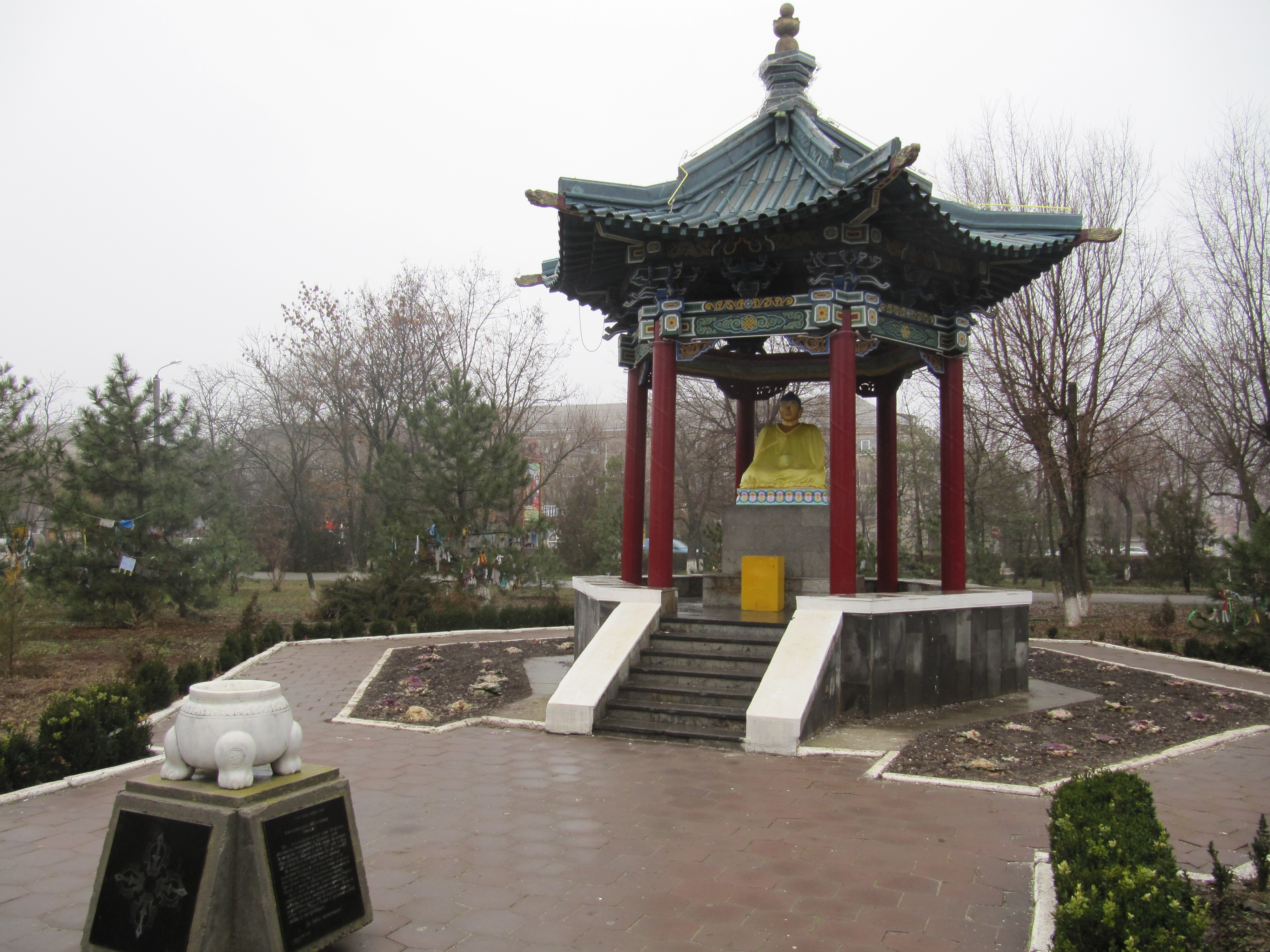 Беседка с Буддой, Элиста, Калмыкия